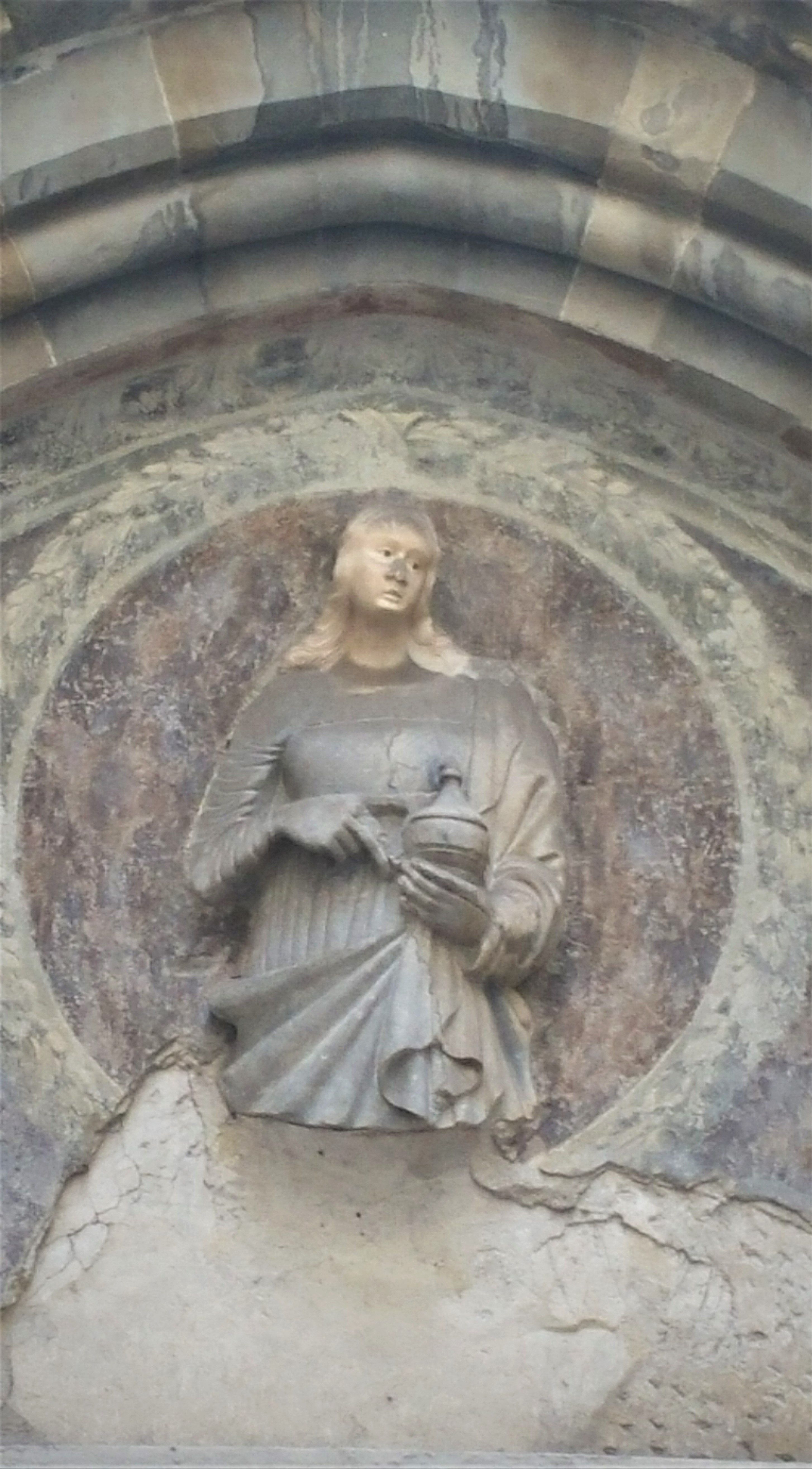 santa Maria Maddalena esterno alla chiesa